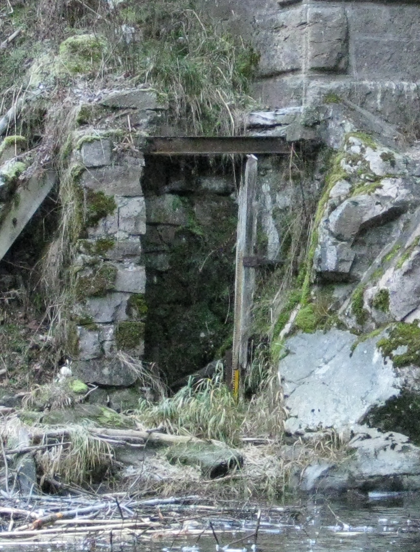 Aufgelassener Pegel an der Stallegger Brücke